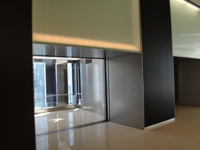 梅田阪急ビル・シャトルエレベータをホールから室内を見たところ(定員80名)